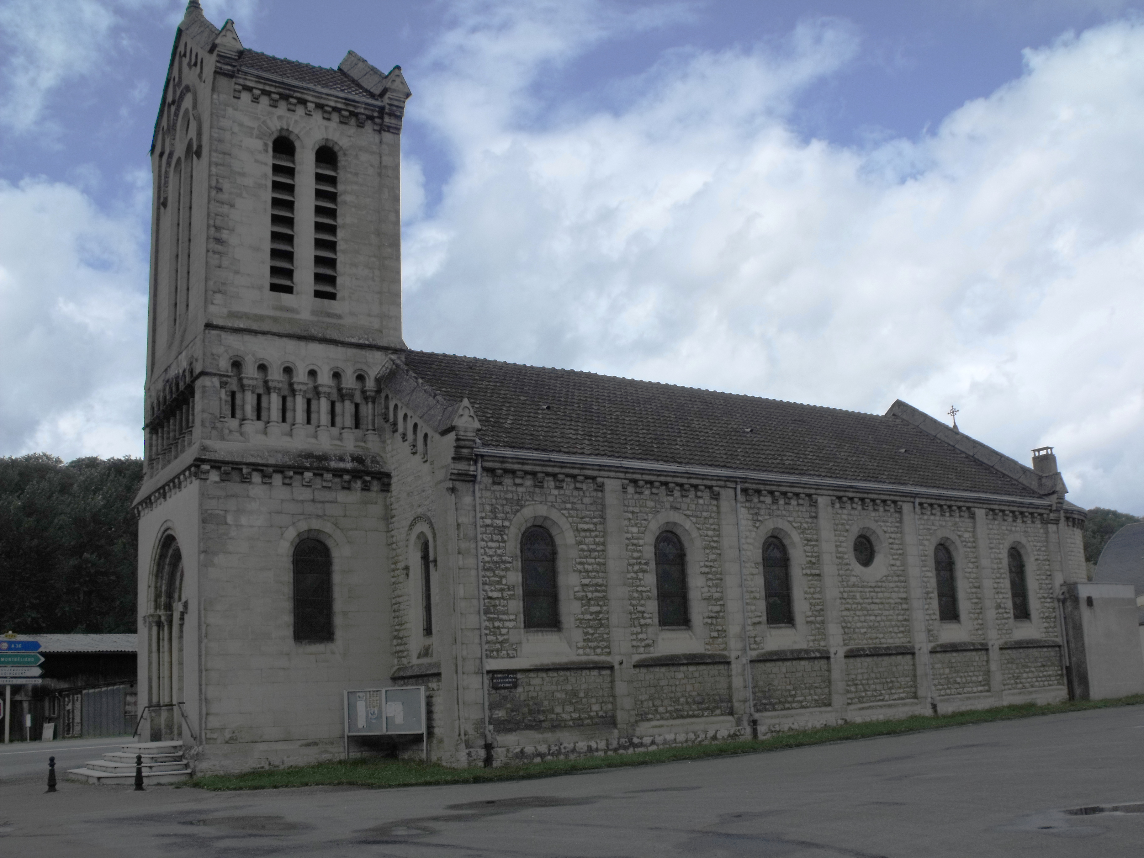 Eglise de Colombier-Fontaine, Doubs, France